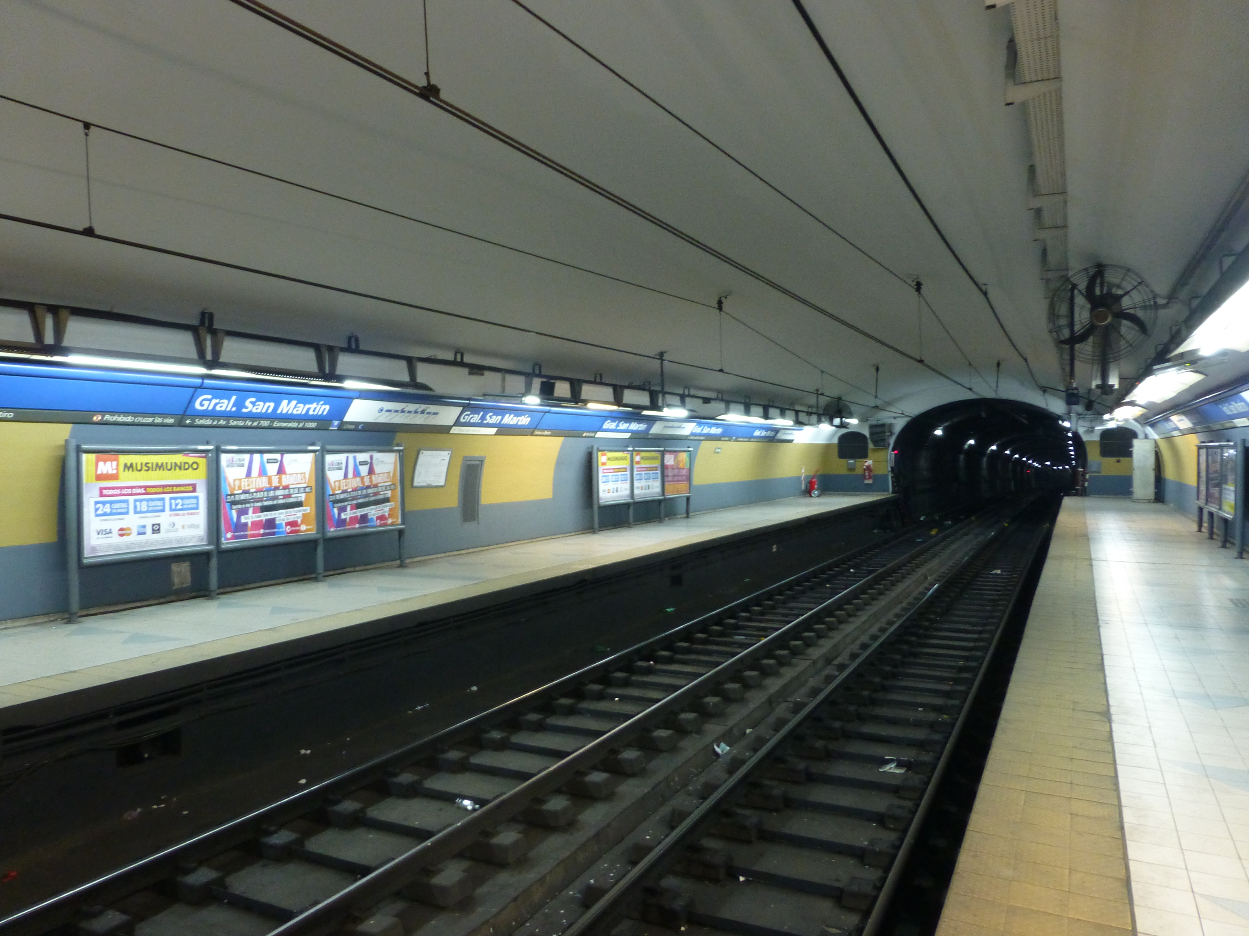 Estación General San Martin, del Subte de Buenos Aires.